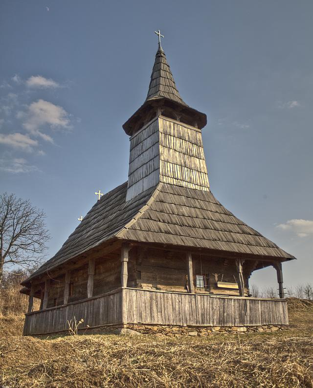 Biserica de lemn din Porţ, judeţul Sălaj.